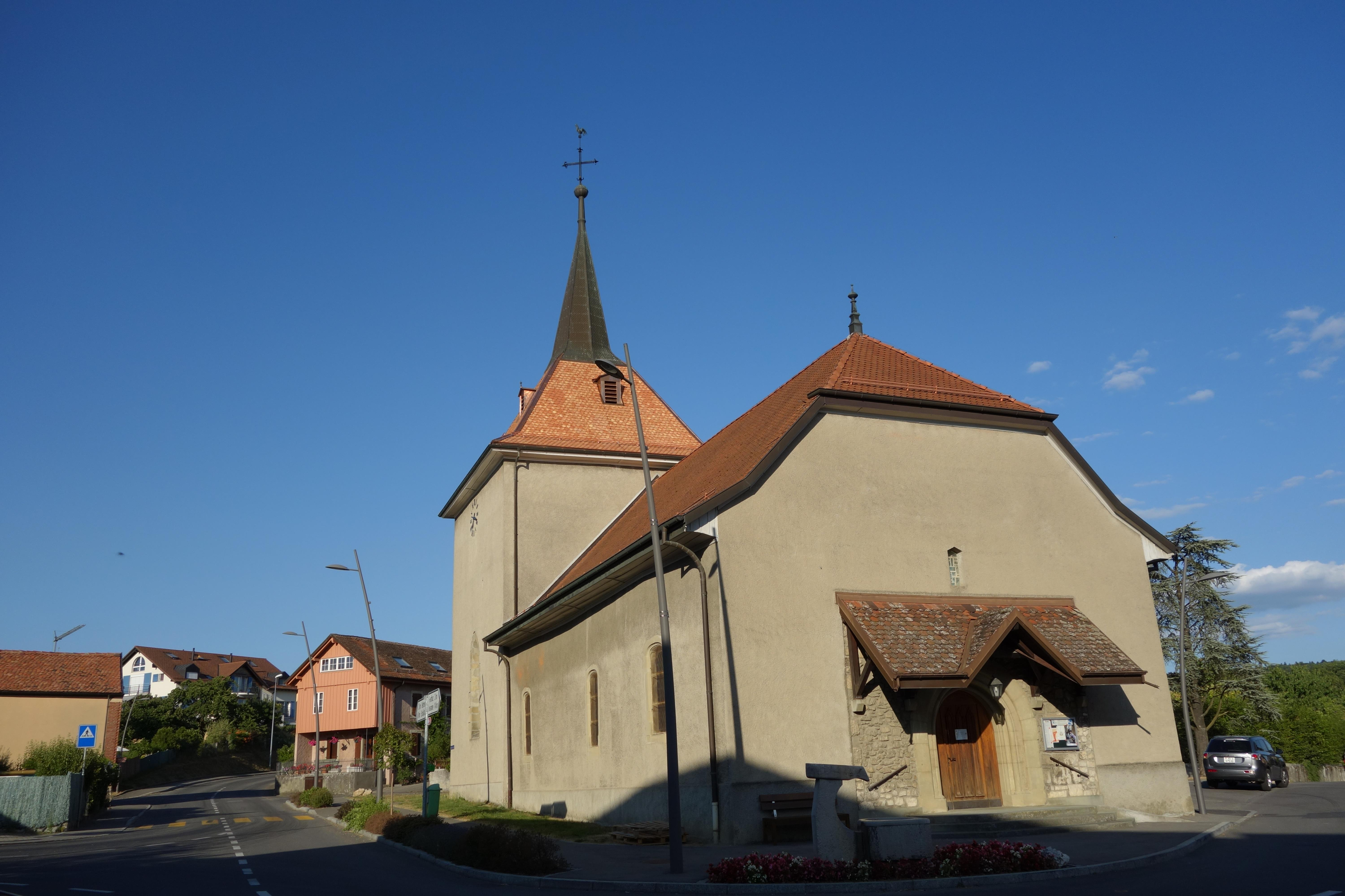 Daillens (Suisse, canton de Vaud) - le temple